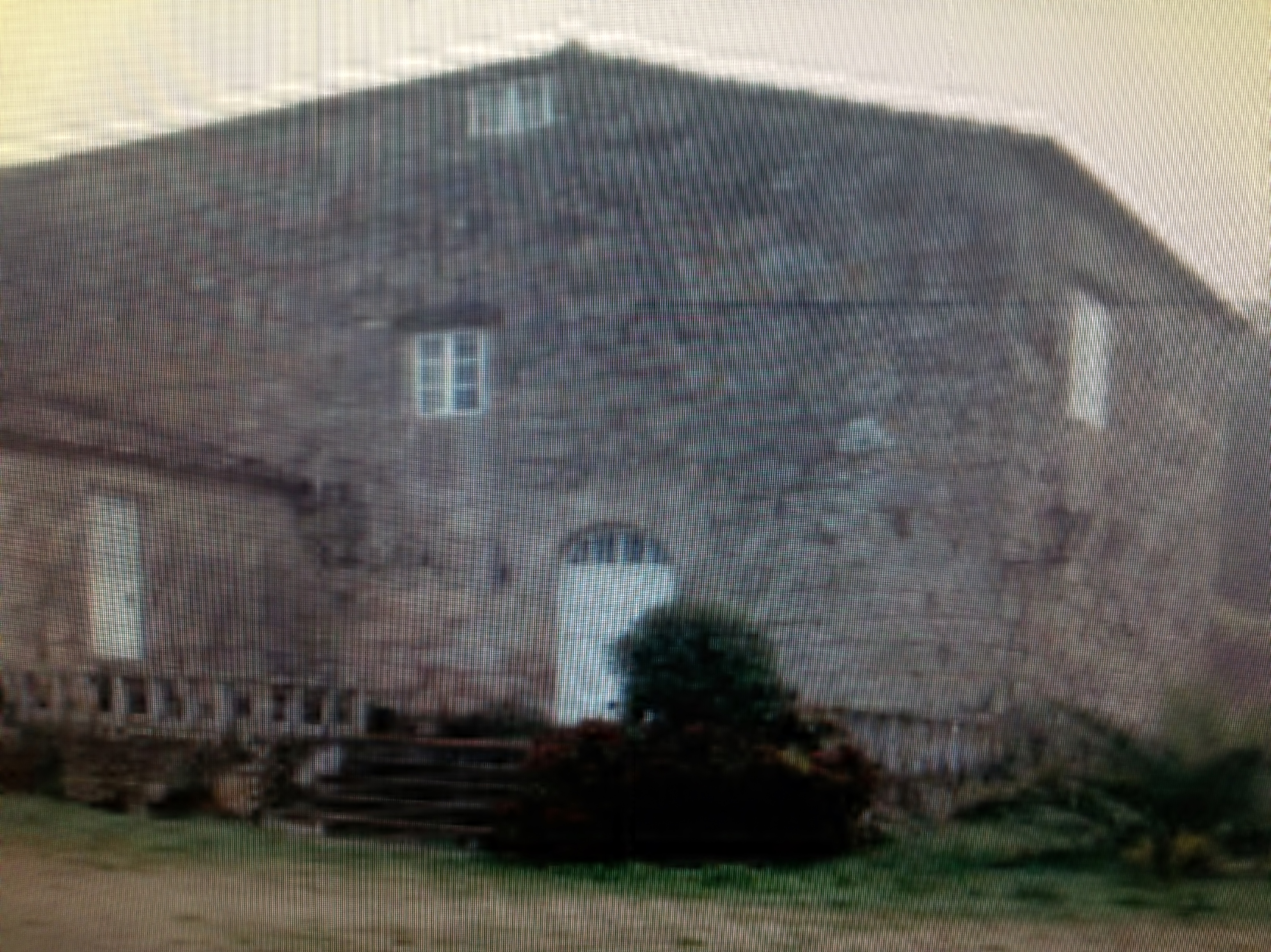 Torre de Couso, o Casa grande de Maíndo. pazo de los Condes de Ximonde en Pontevea, A Estrada, Pontevedra, España.